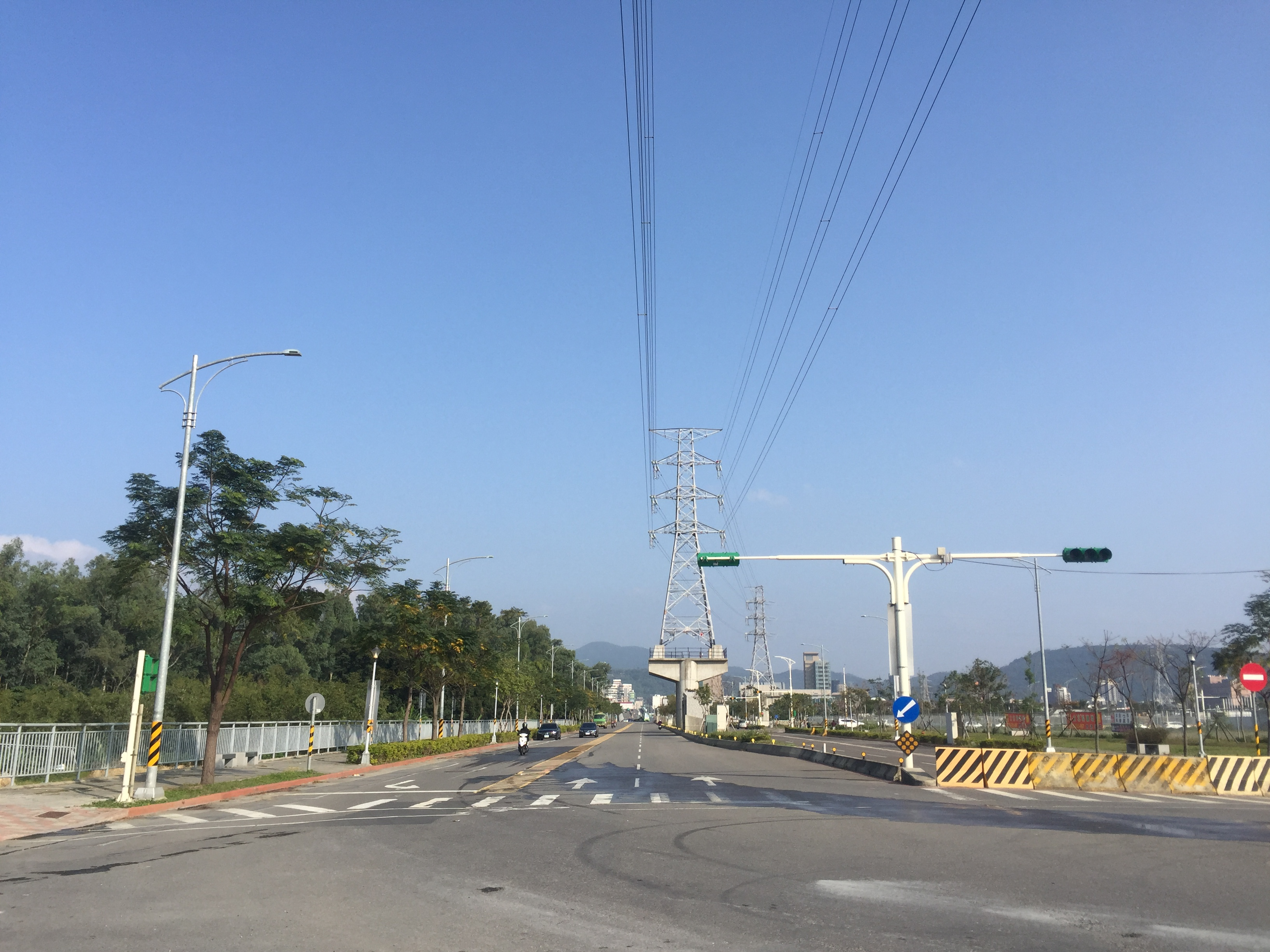 台北市北投區士林北投科技園區新設道路 福國路第二期延伸段